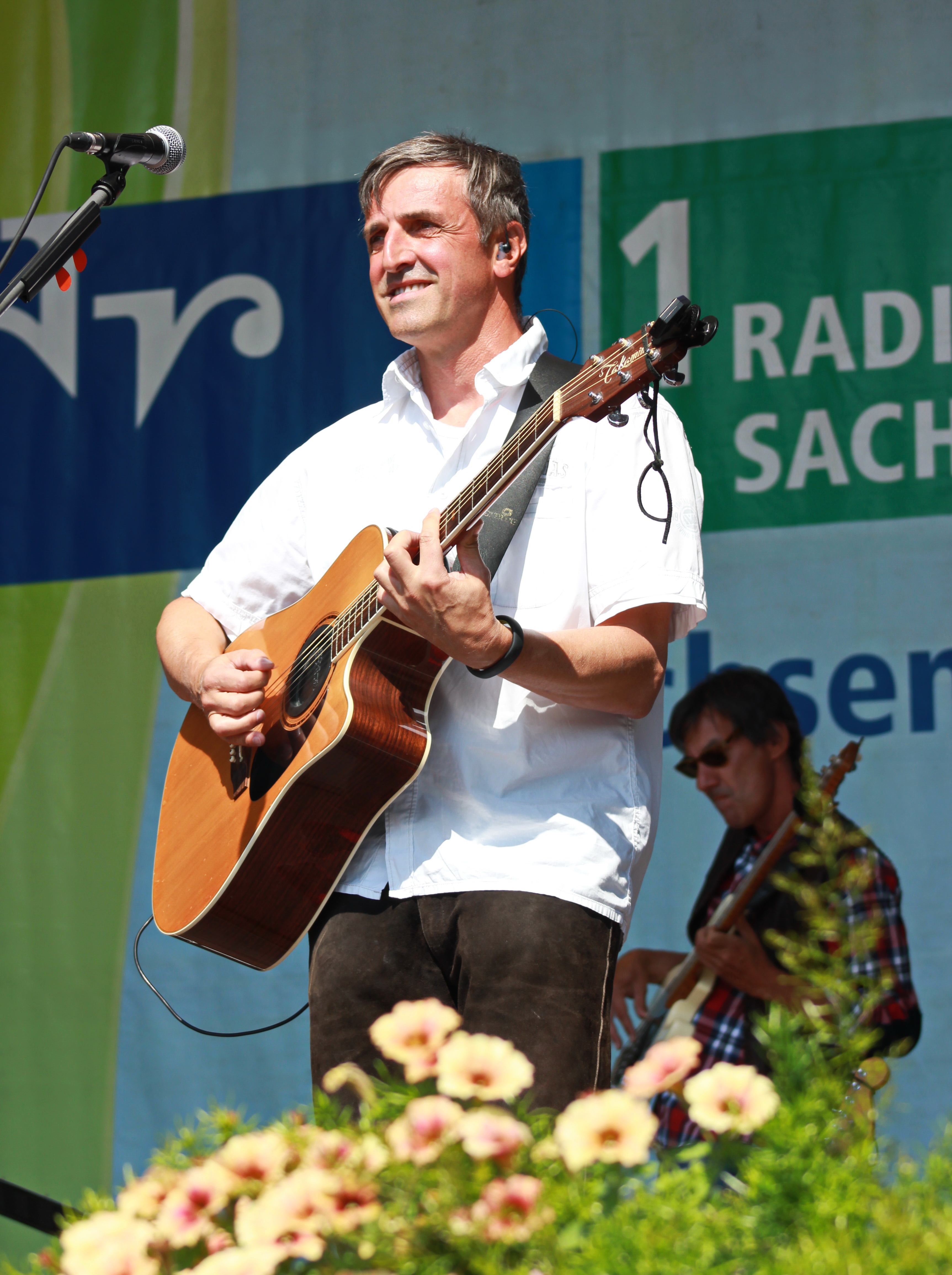 Gruppe Randfichten im Erzgebirge. Veranstaltung in Oelsnitz. Landesgartenschau 2015.